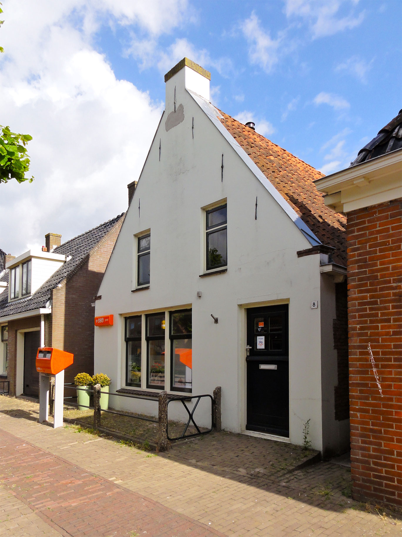 Voorstraat 8 in Blija